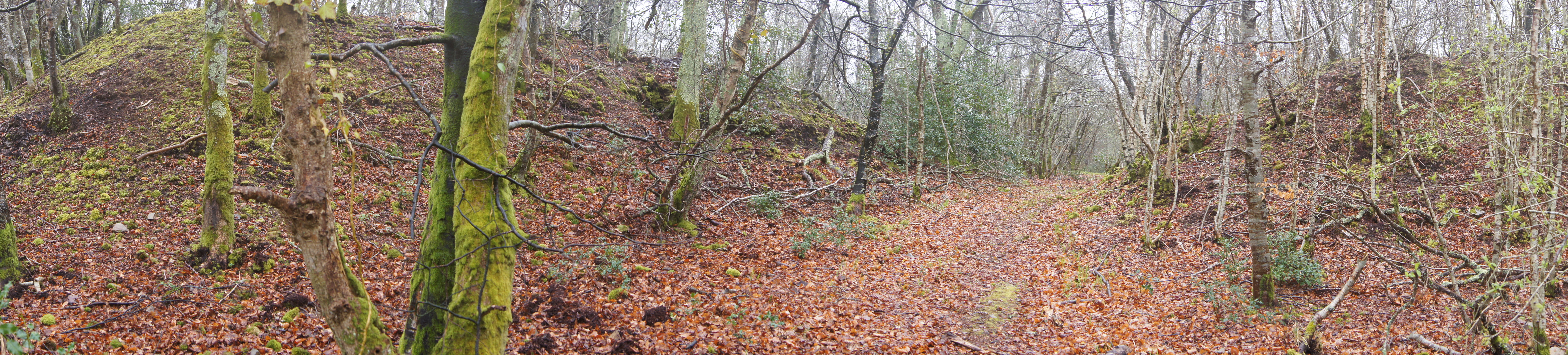 Retranchement de terre protohistorique du Mont Castre dit Camp de César Beau-coudray Le Plessis-Lastelle